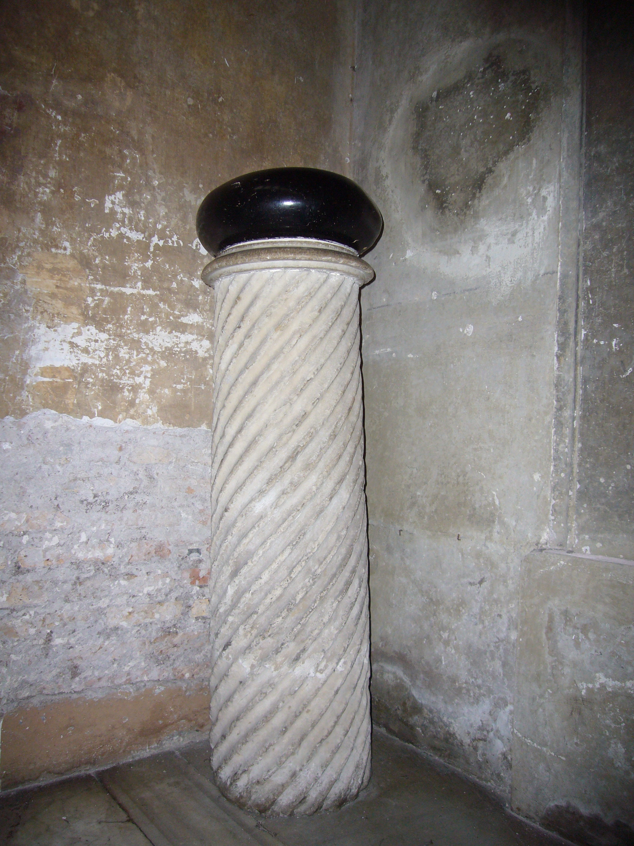 Roma, basilica di santa Sabina: il lapis diaboli.